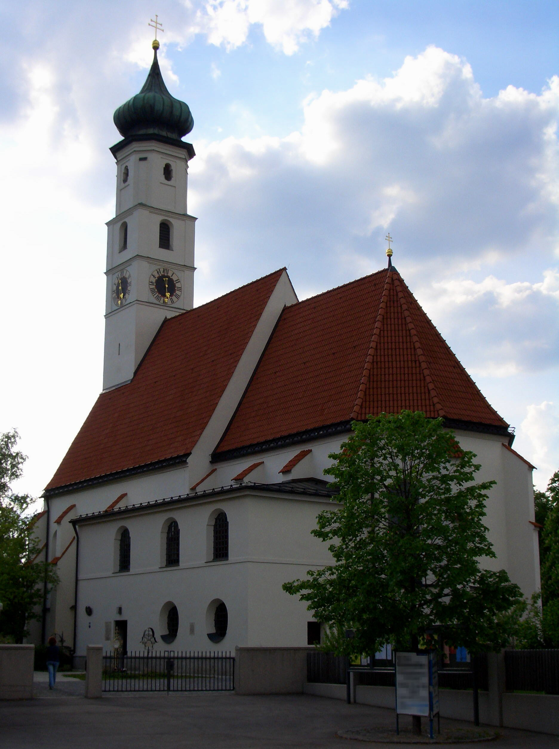 Kirche Heilig Kreuz in München-Forstenried von Osten.